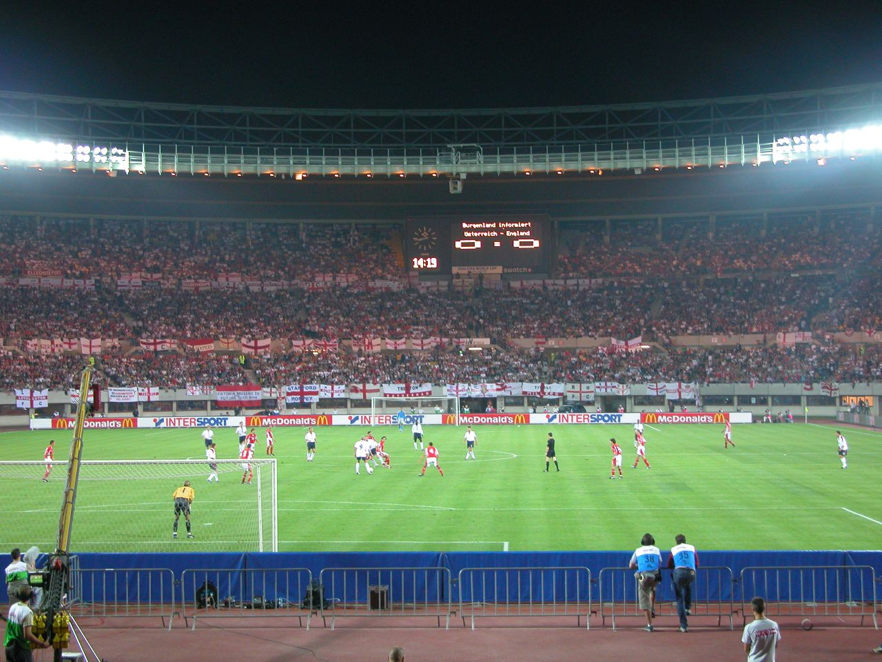 Österreich - England, WM-Quali 2006, Ergebnis 2:2